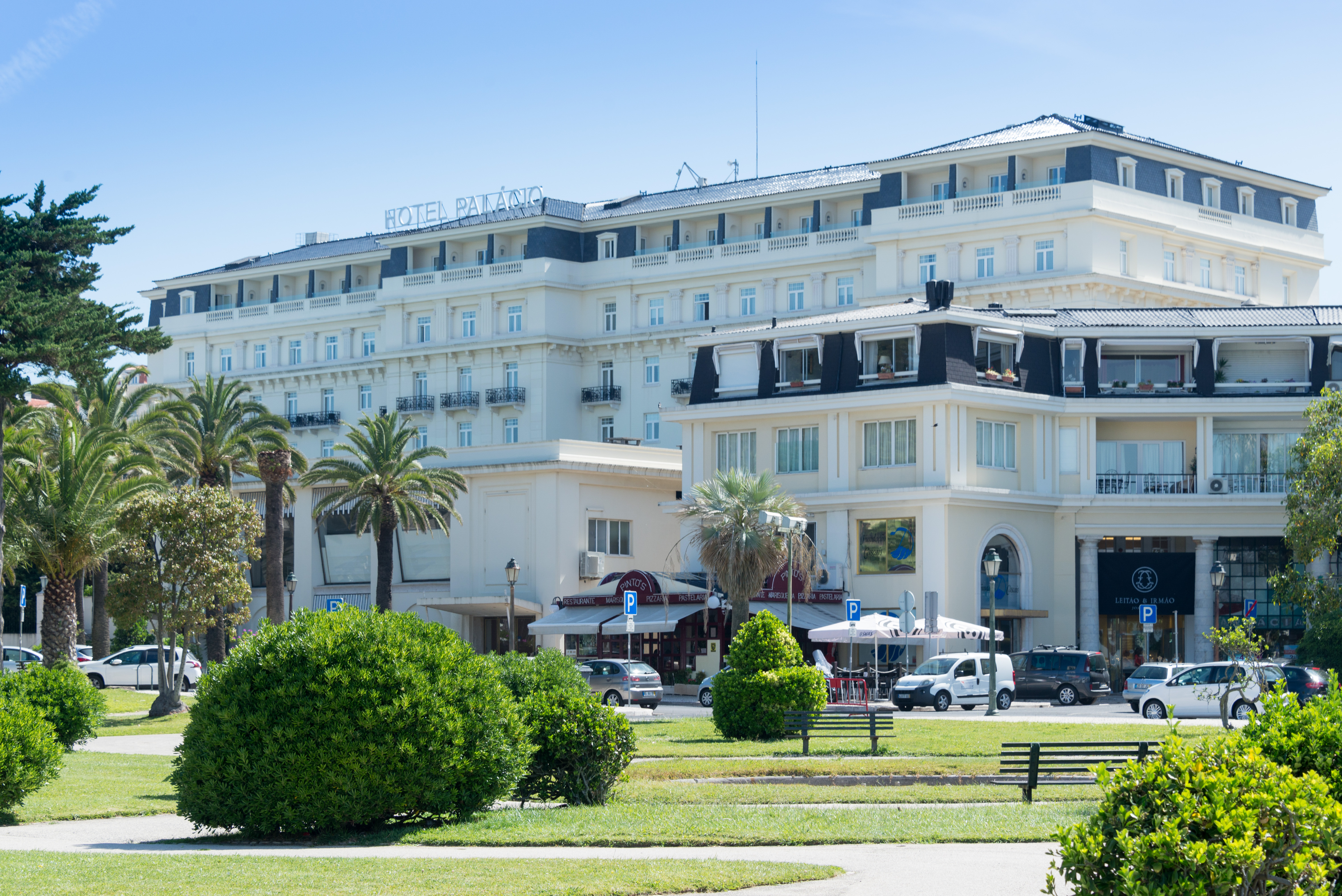 33068-Lisbon